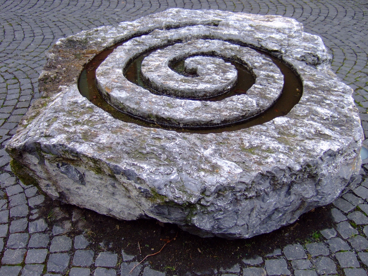 Klaus Simon: Im Gesteins - unter N.N. (2001)Material: KalksteinBonn – Rheinisches Landesmuseum (Außenbereich)